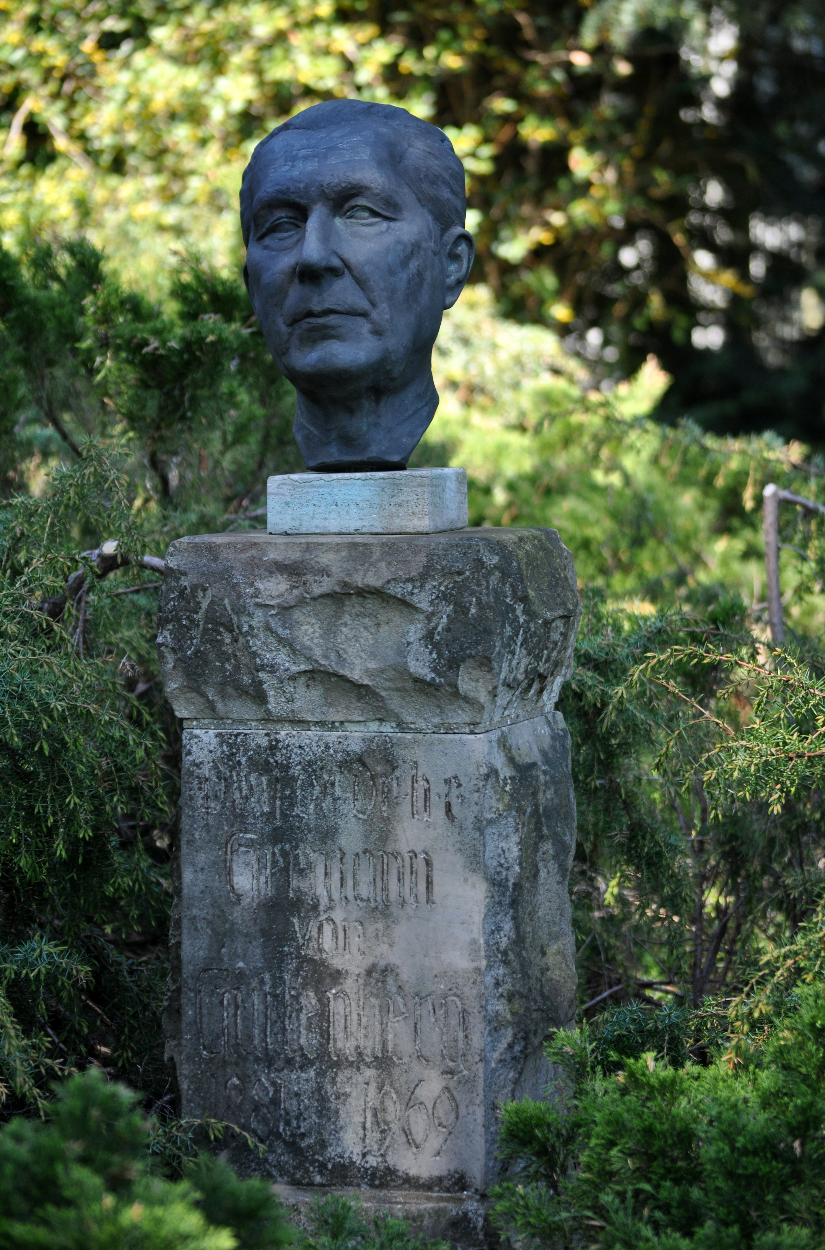 Büste des Botanikers Hermann von Guttenberg; Künstlerin: Hertha von Guttenberg